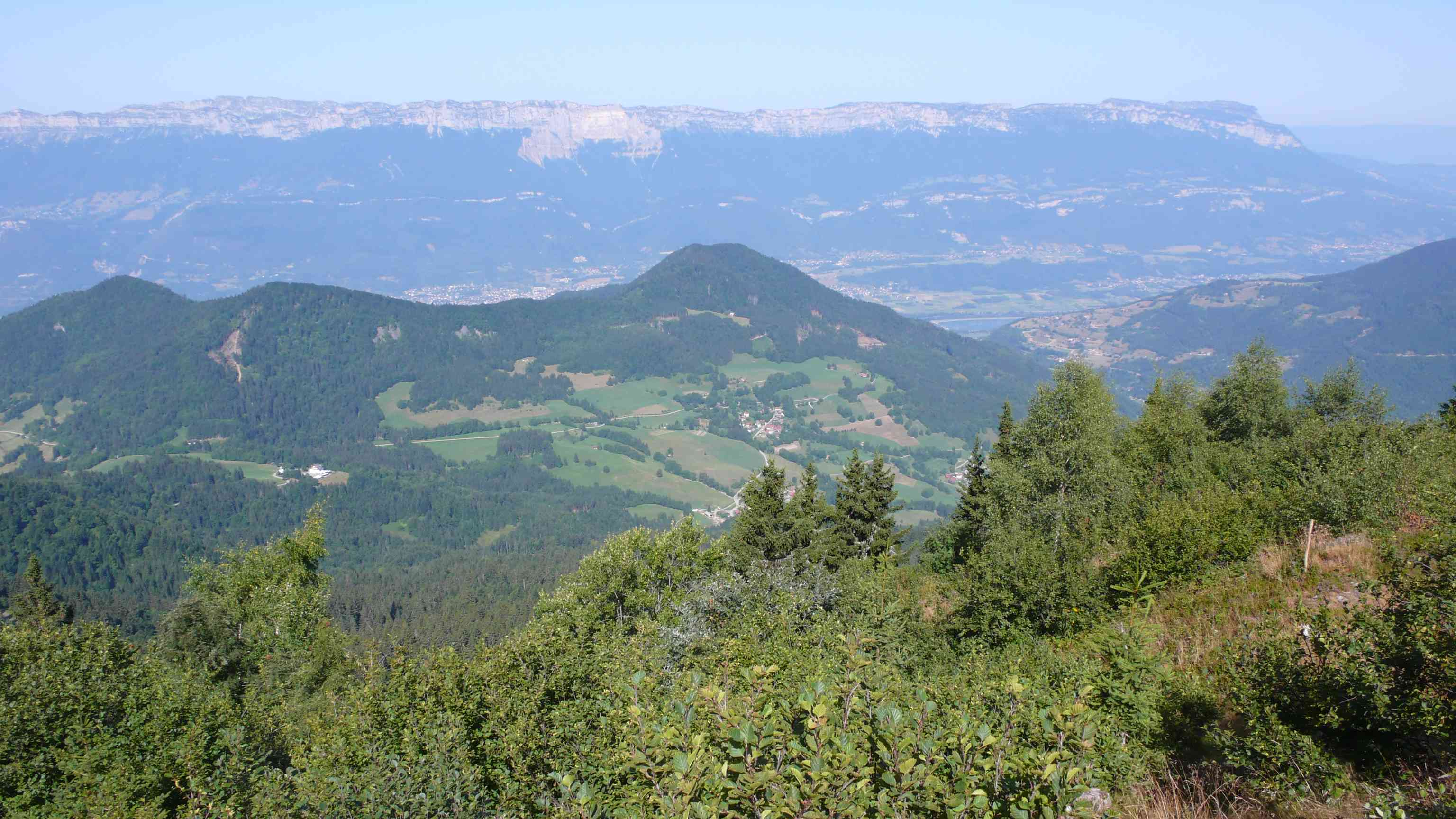 Emplacement du col du Barioz, qui relie la commune de Crêt en Belledonne à celle de Theys, sur la route des balcons de Belledonne. Vue depuis le Crêt du Poulet. Au fond, la vallée du Grésivaudan et le massif de la Chartreuse.